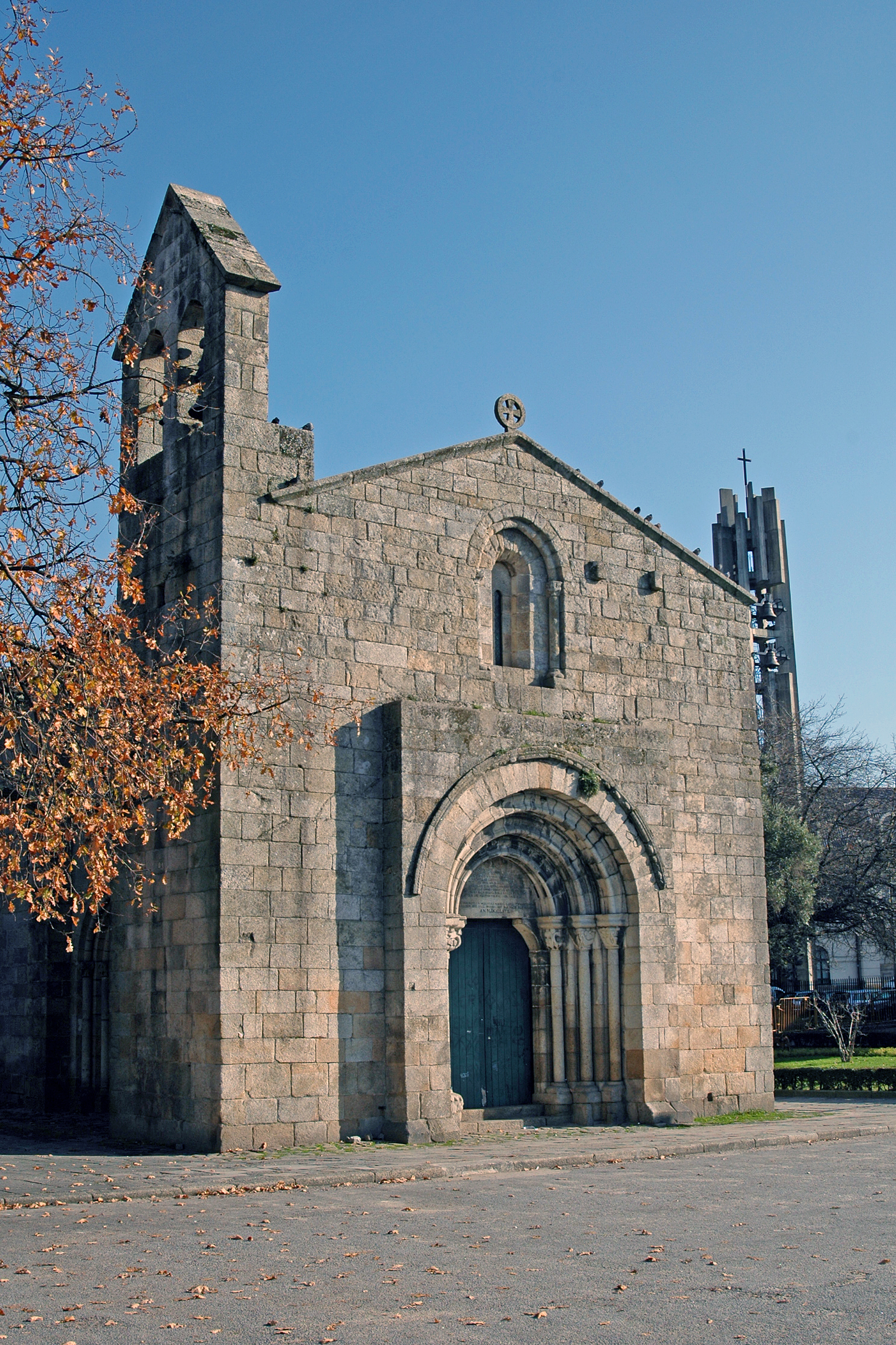 Igreja de São Martinho de Cedofeita ou Românica de Cedofeita